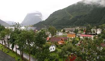 Sæbø i Hjørundfjord. Bilete er teke frå kyrkjetårnet på Hjørundfjord kyrkje og viser Sæbø mot sør-aust. ( Eli Anne Tvergrov)